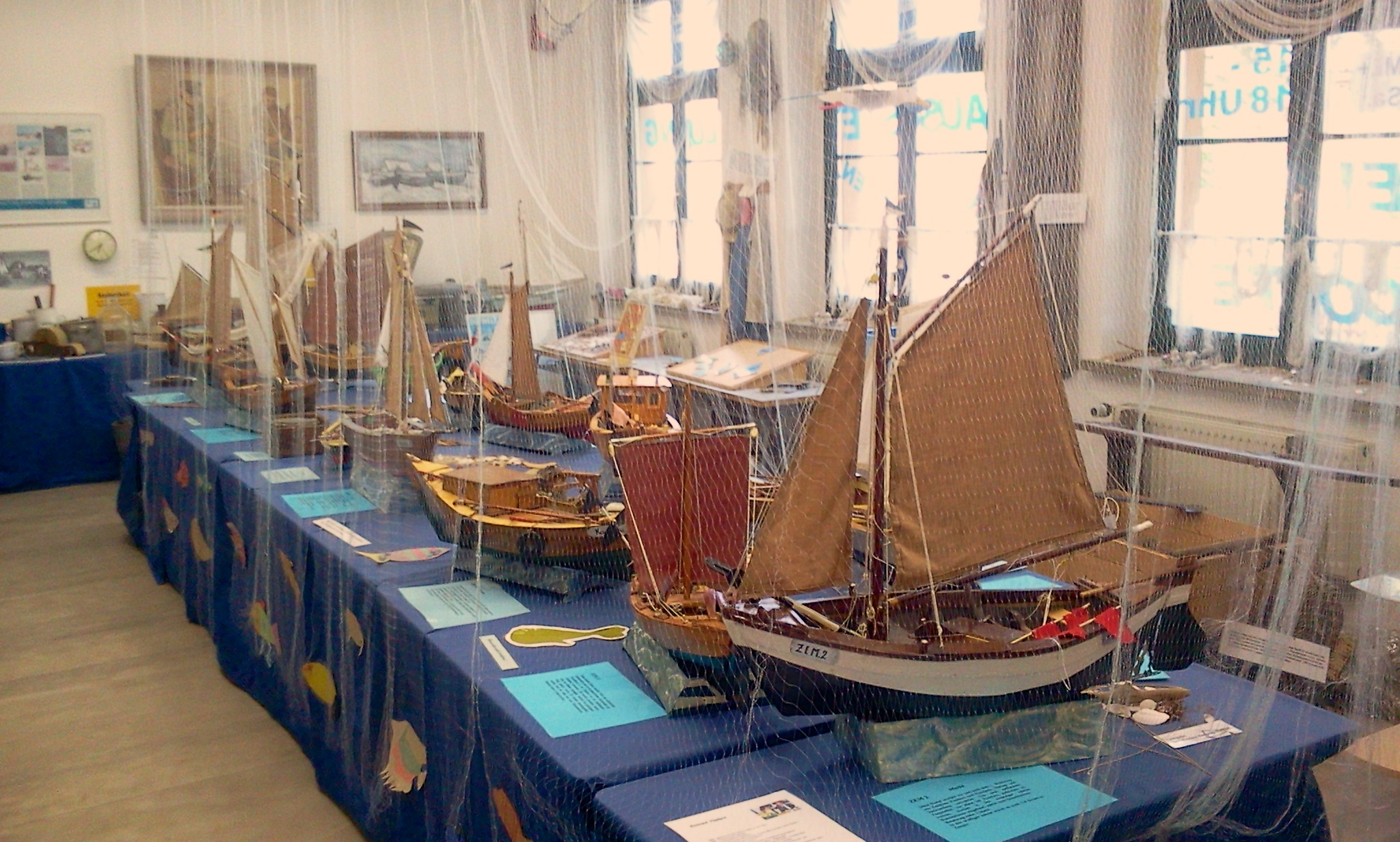 Heimatmuseum Zempin, Usedom. Fischereiausstellung. Modelle des Fischers Konrad Tiefert.